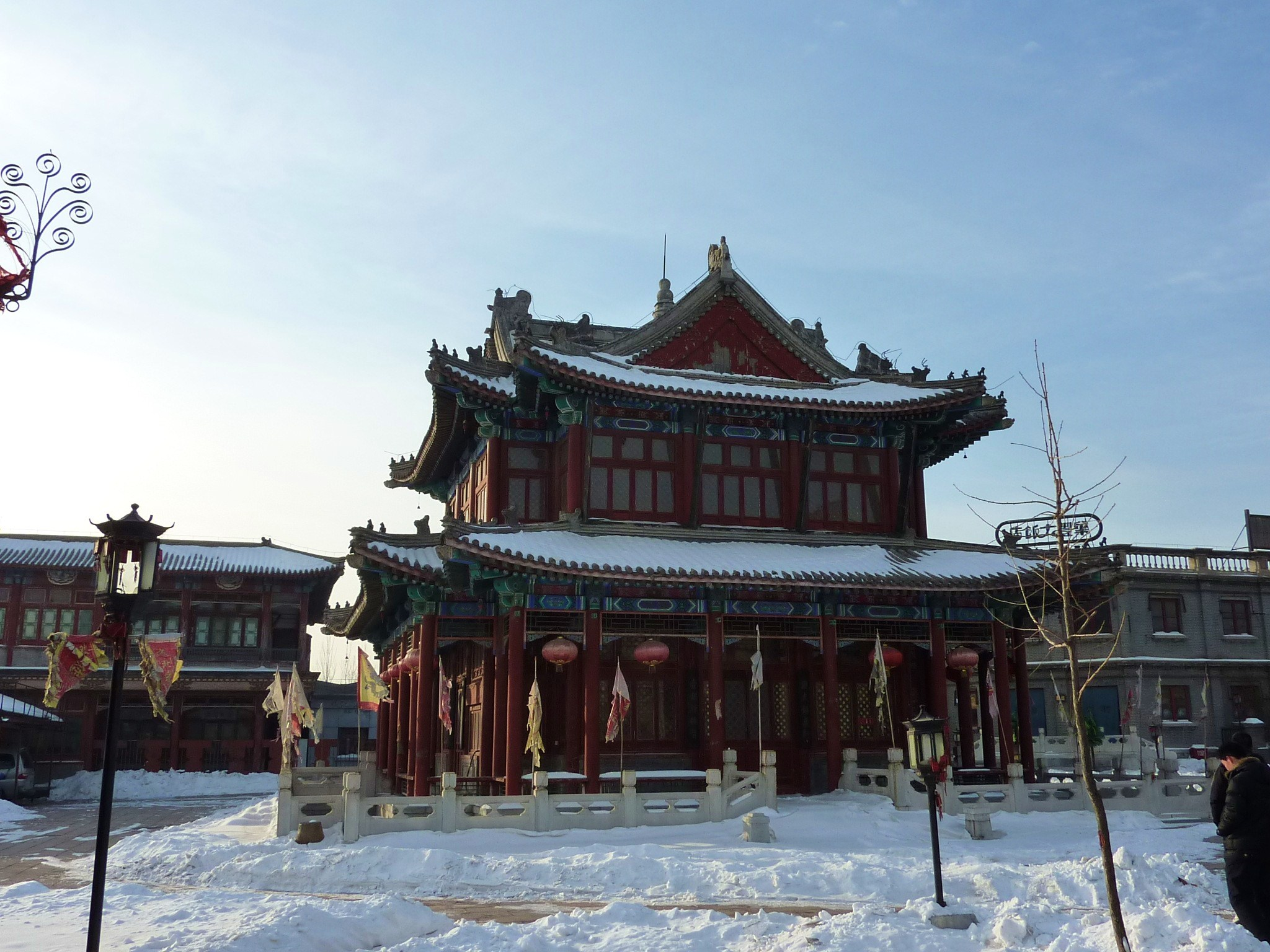 ·˙·ChinaUli2010·.· Beijing